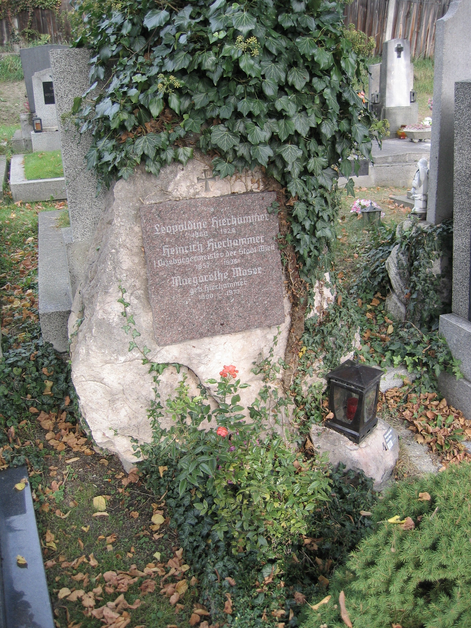 Ehrengrab von Heinrich Hierhammer auf dem Friedhof Wien Hernals (Gruppe 51 Nr. 4)